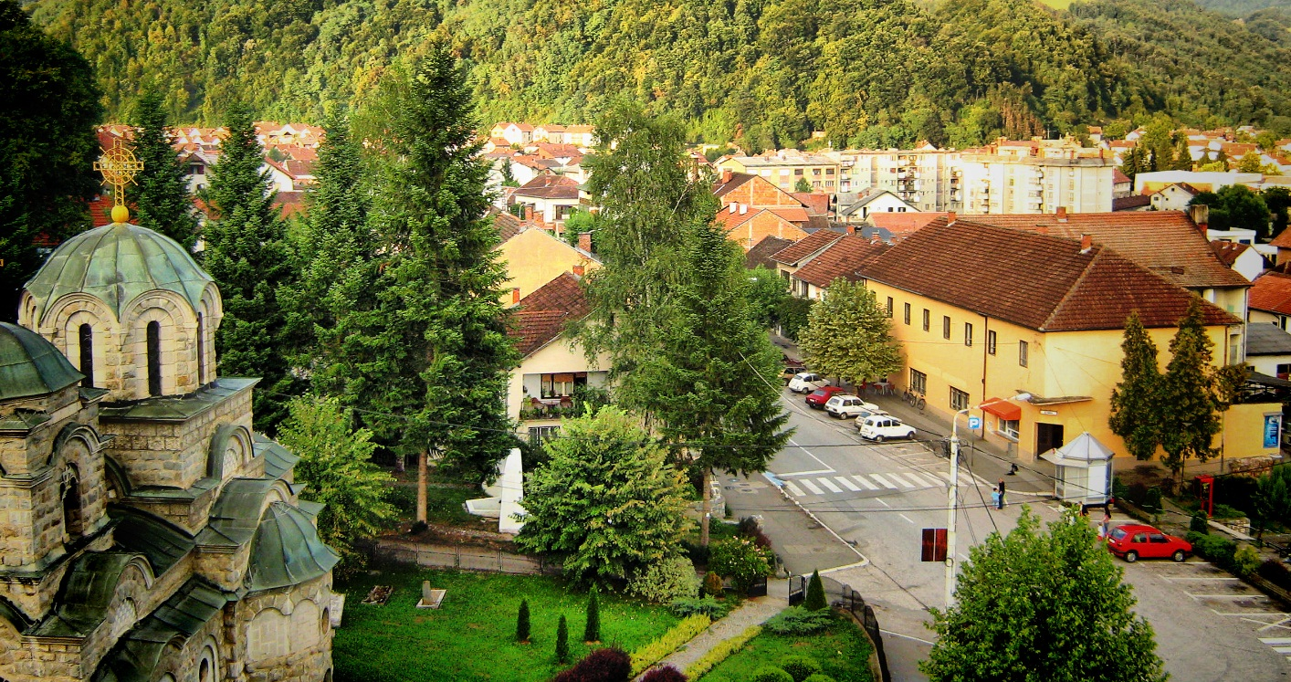 Ljubovija